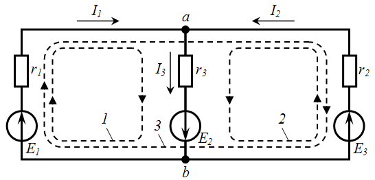 Схема замещения простейшей электрической цепи